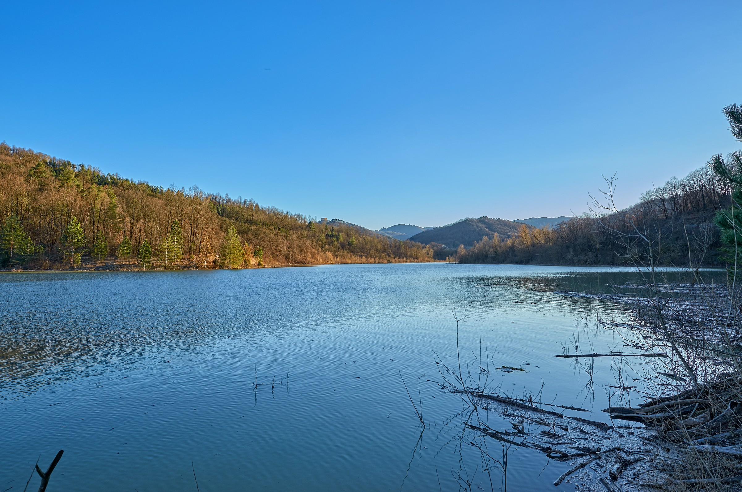 Vista verso Zavattarello